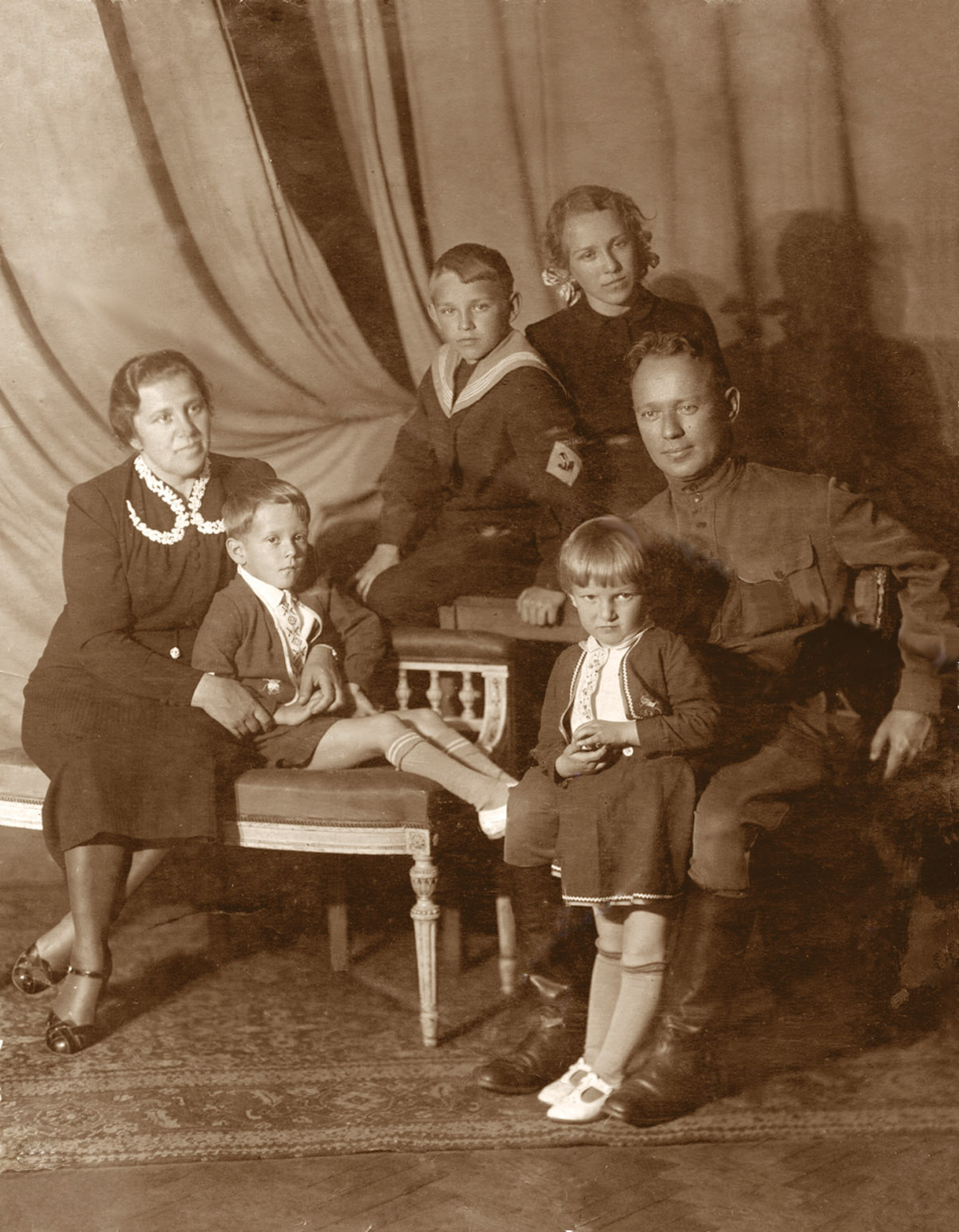 Апрель 1941 г. М. А. Шолохов с семьёй. Фотография Г. Вайля (фотография из личного архива старшей дочери писателя С. М. Шолоховой).